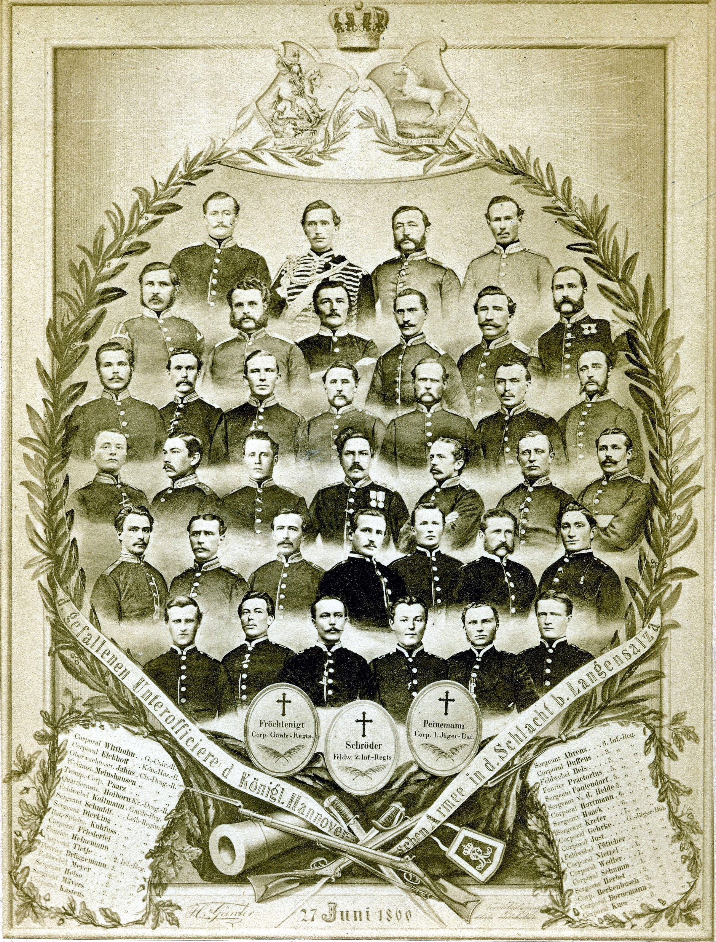 sogenanntes „Mosaikbild“ (eine spezielle Fotomontage insbesondere im 19. Jahrhundert) d. gefallenen Unterofficiere d Königlich Hannoverischen Armee in d. Schlacht b. Langensalza 27 Juni 1866. Die Umschrift bei den Wappen lautet links: NUNQUAM RETRORSUM ("niemals zurück"),der Wahlspruch der Welfen und rechts: NEC ASPERA TERRENT ("Widrigkeiten schrecken nicht") Wahlspruch auf den Fahnen der chur-braunschweig-lüneburgischen Armee, siehe Braunschweiger Landeswappen. Am unteren rechten Rand des Druckes weisen die Urheber darauf hin: „Vervielfältigung bleibt vorbehalten“. Das Originalbild ist (ohne Ränder) 10 cm x 13,5 cm groß. Das Blatt hat unten einen Blindprägestempel mit dem Hinweis auf das Atelier Herm. Günter, Hannover.